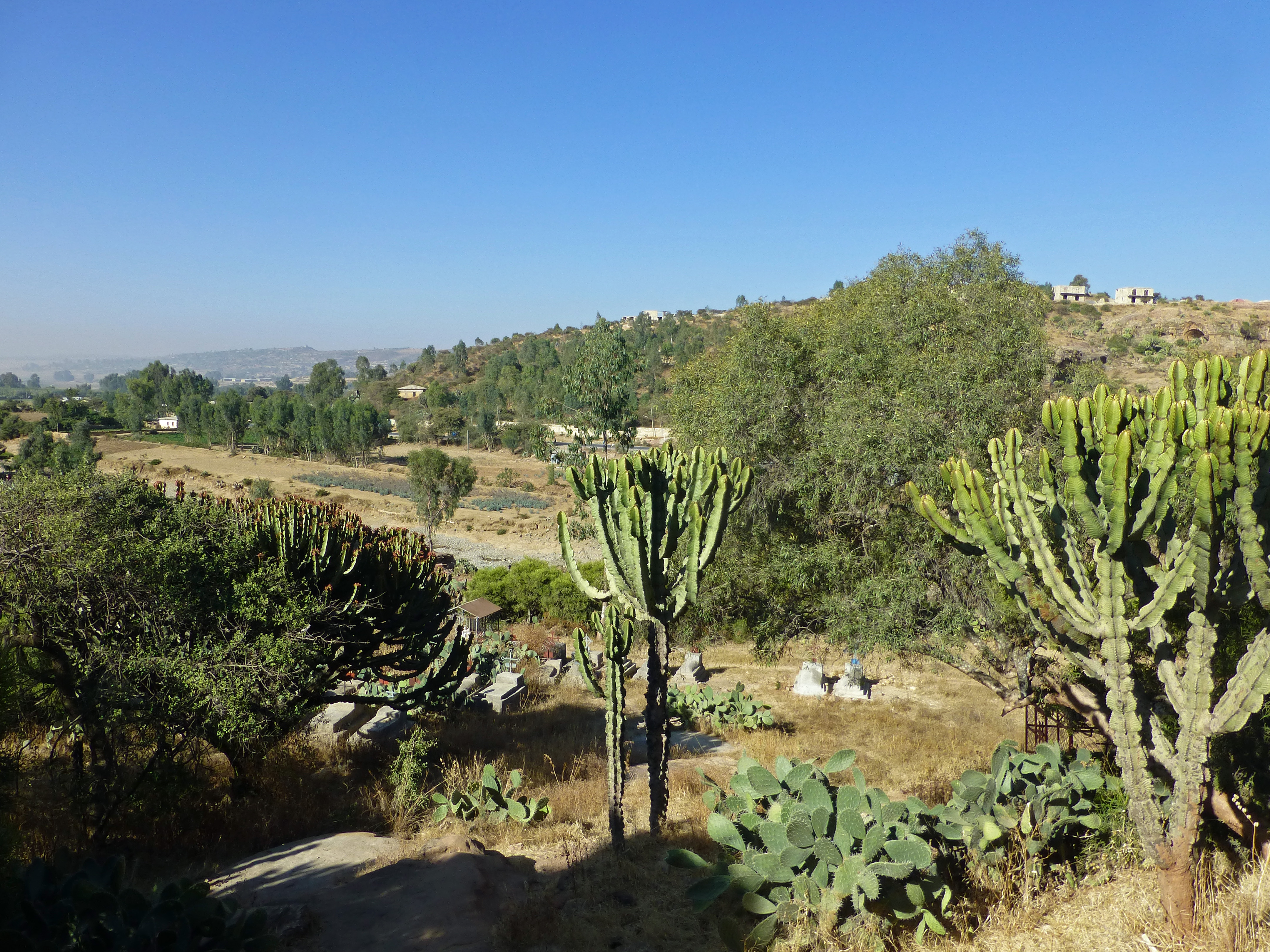 Euphorbia candelabrum à Wukro (Région Tigray, Ethiopie)